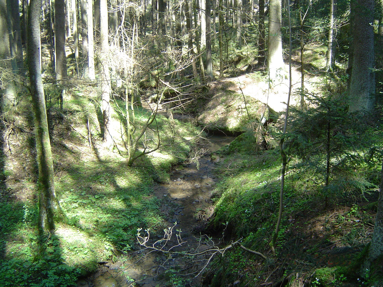 Schlucht Arzloch von Mistelbach - Naturdenkmal (Geotop-Nr. 472R022)